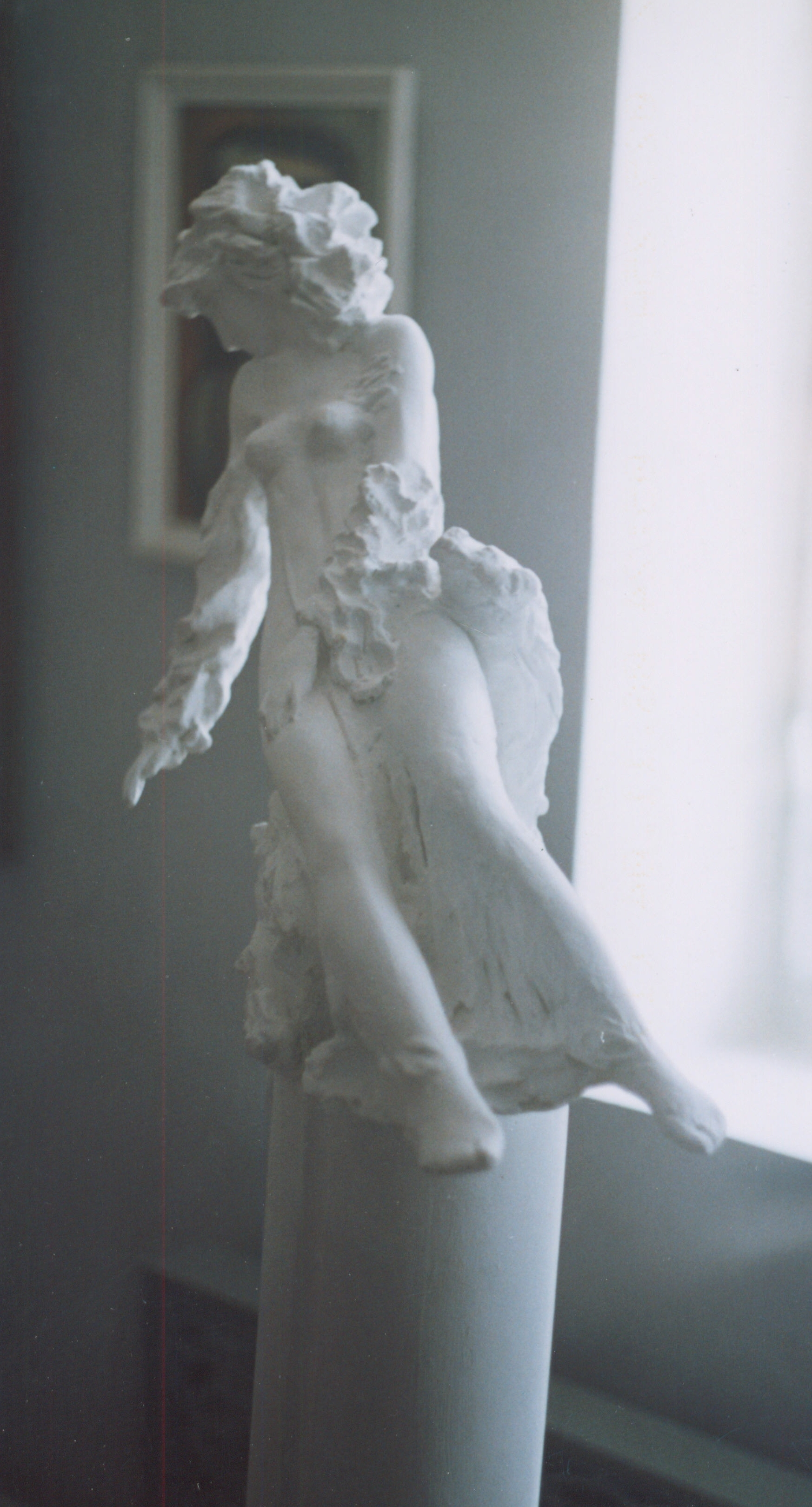 Константин Козловский. «Муза», 1993 г., гипс, 130 см